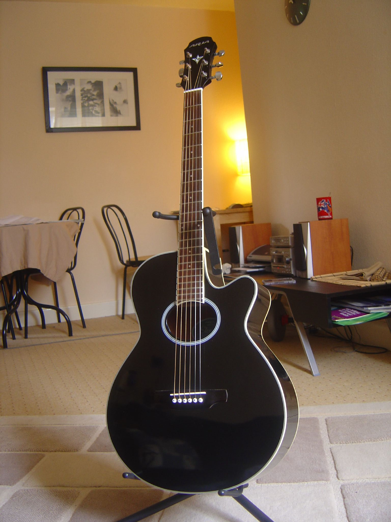 aria accoustic guitar